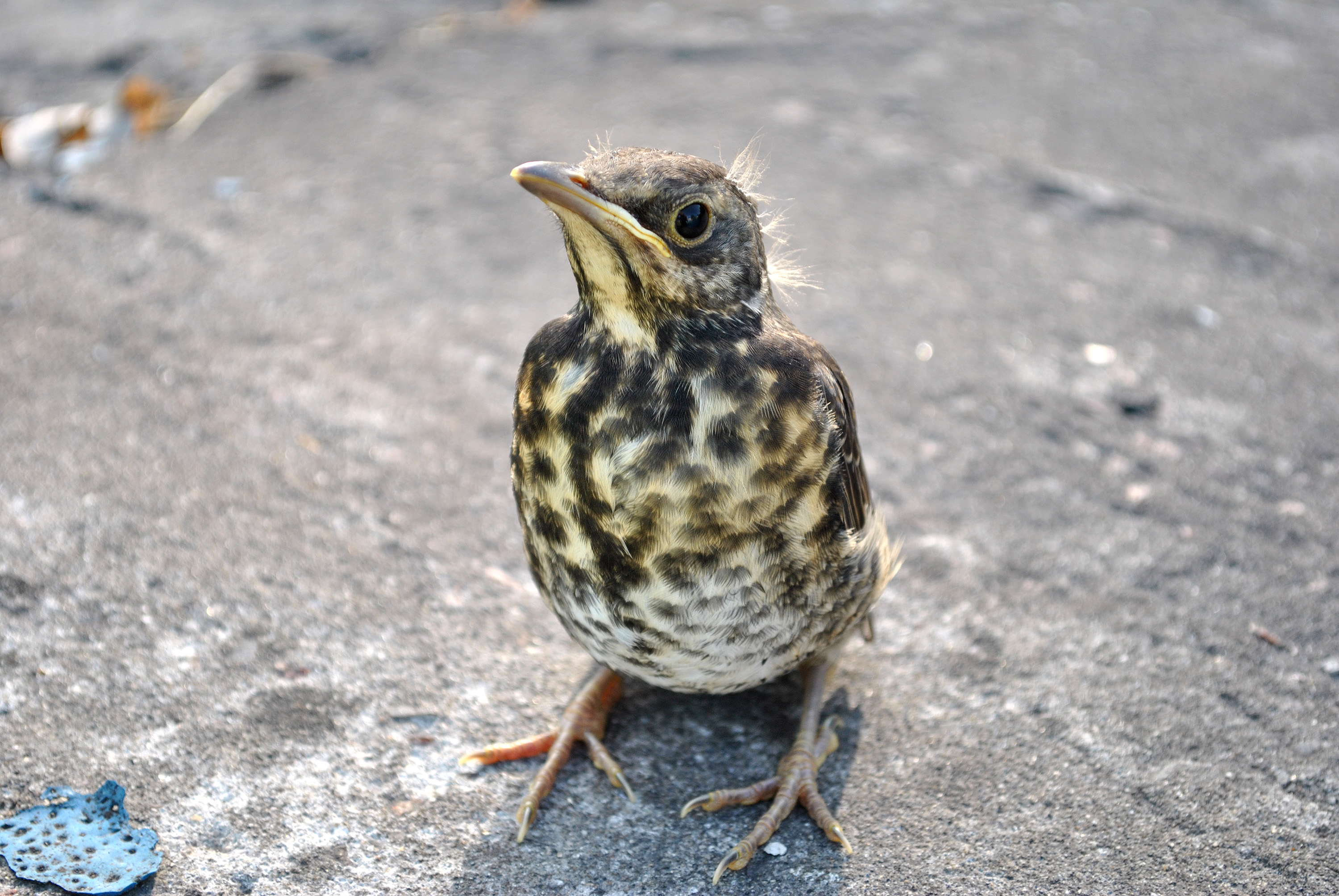 Молодий дрізд у Жнибородах Бучацького району Тернопільської області.